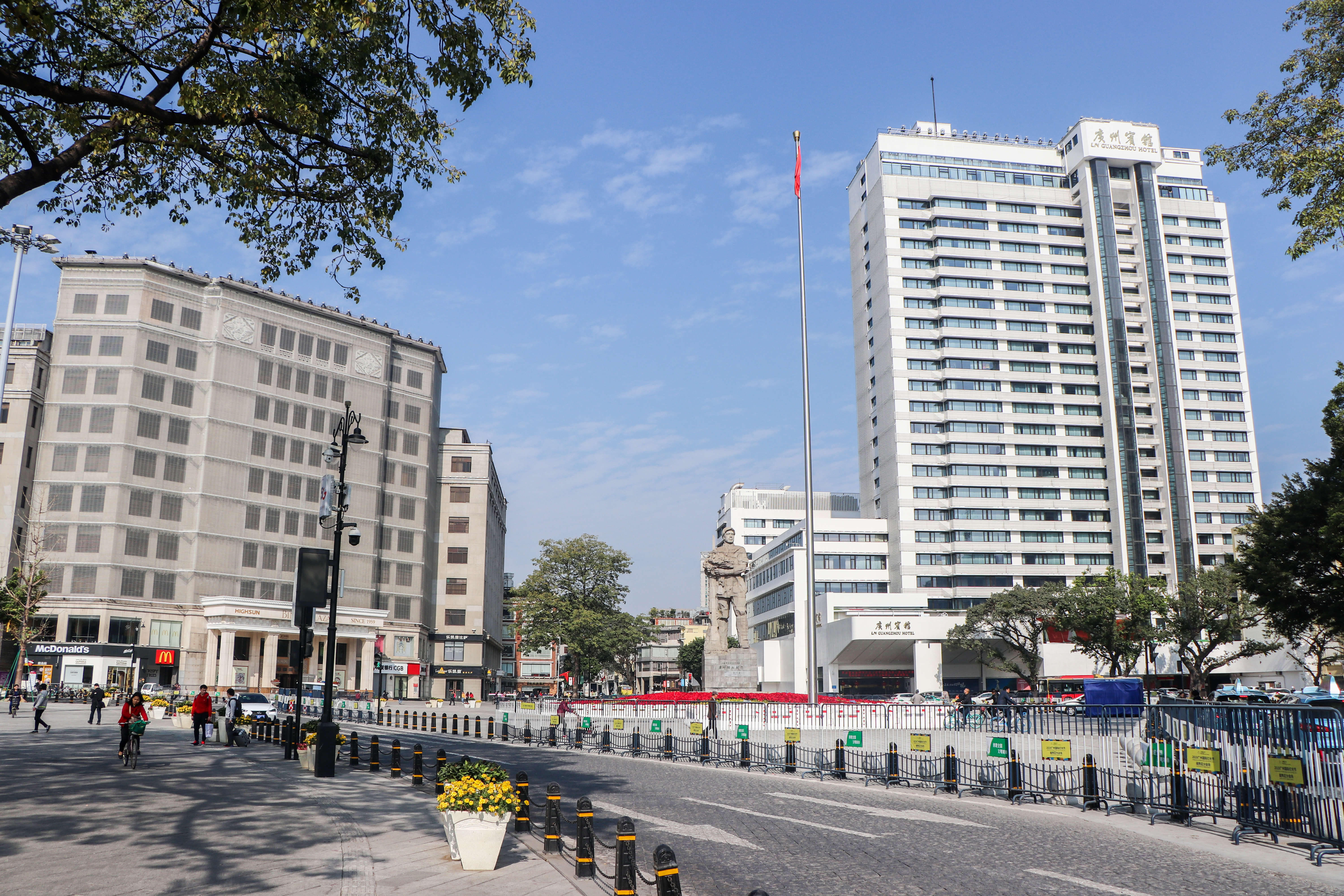 2019年12月28日的海珠广场